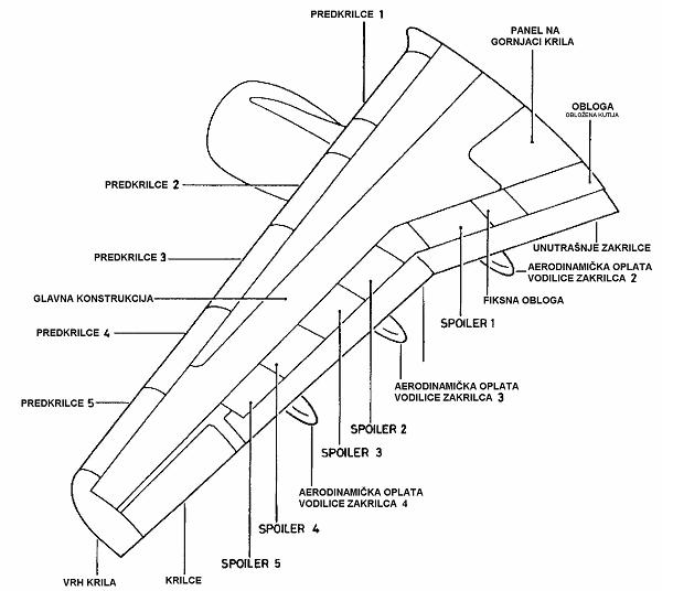 Krilo A 319